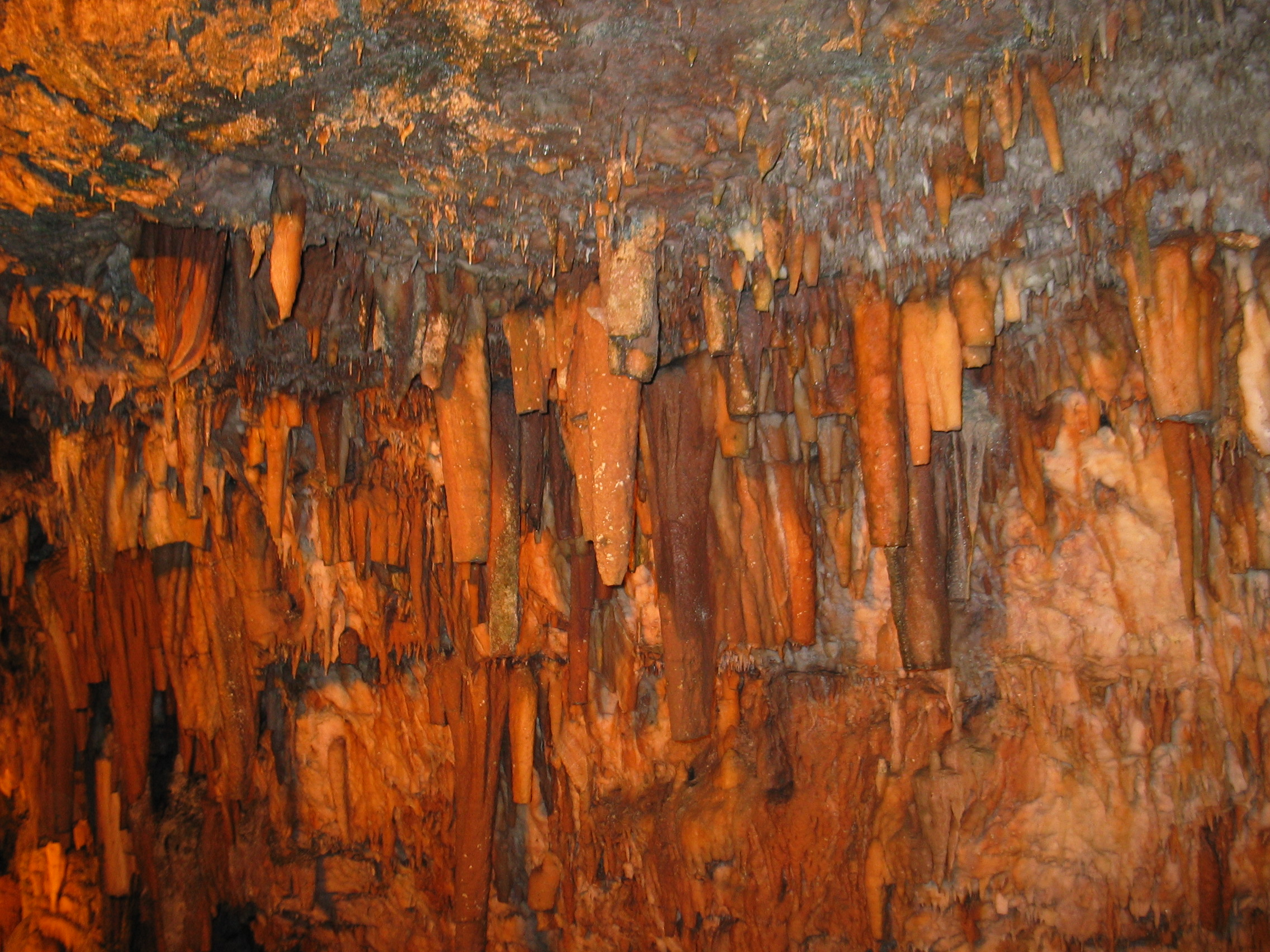 Druipsteengrot op Kefalonia. Foto is gemaakt op 16 juni 2005 door H. de Vegt